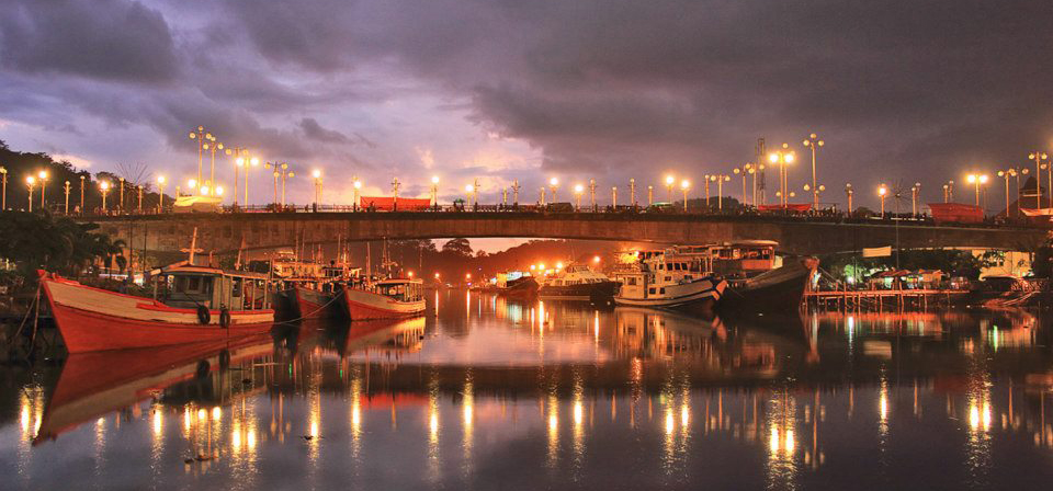 Jembatan di Padang